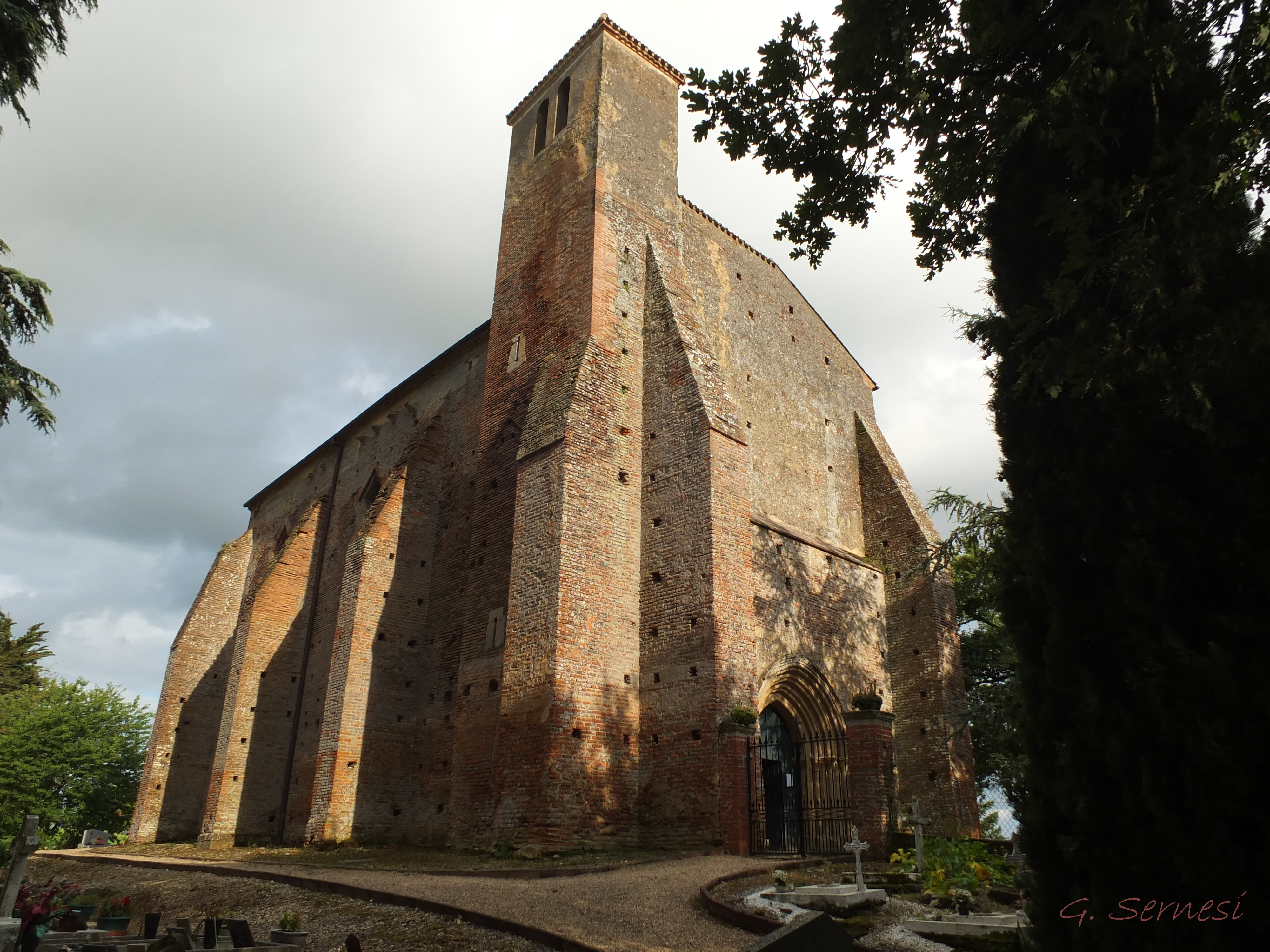 750 ans que cet édifice brut et majestueux veille sur les Saint Christaufins